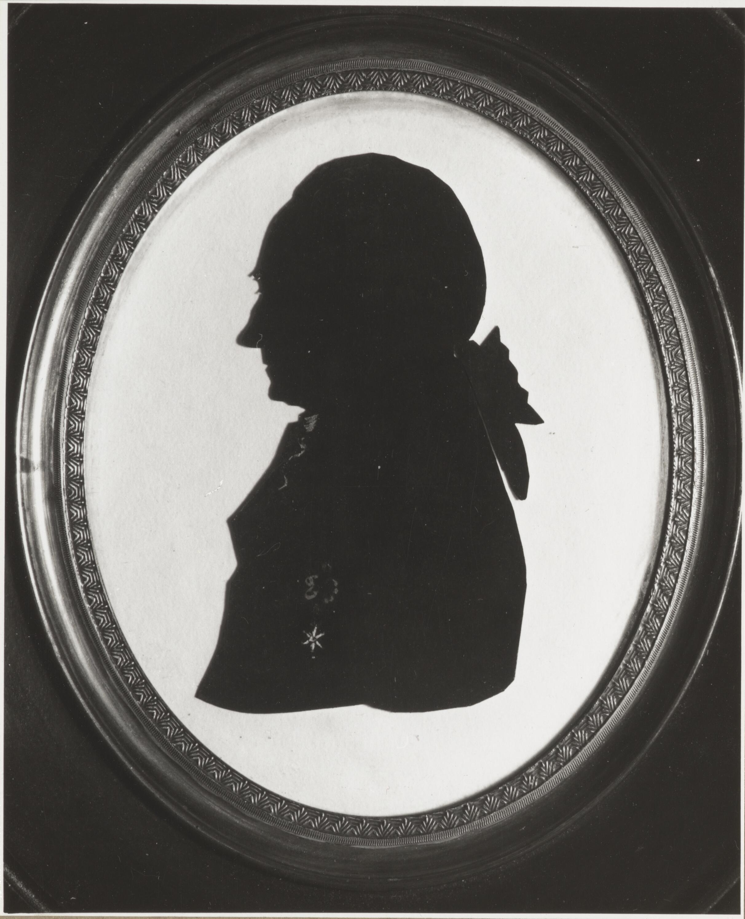 Anoniem portret van Johannes Theodorus Rossyn (1744-1817), met ridderorde